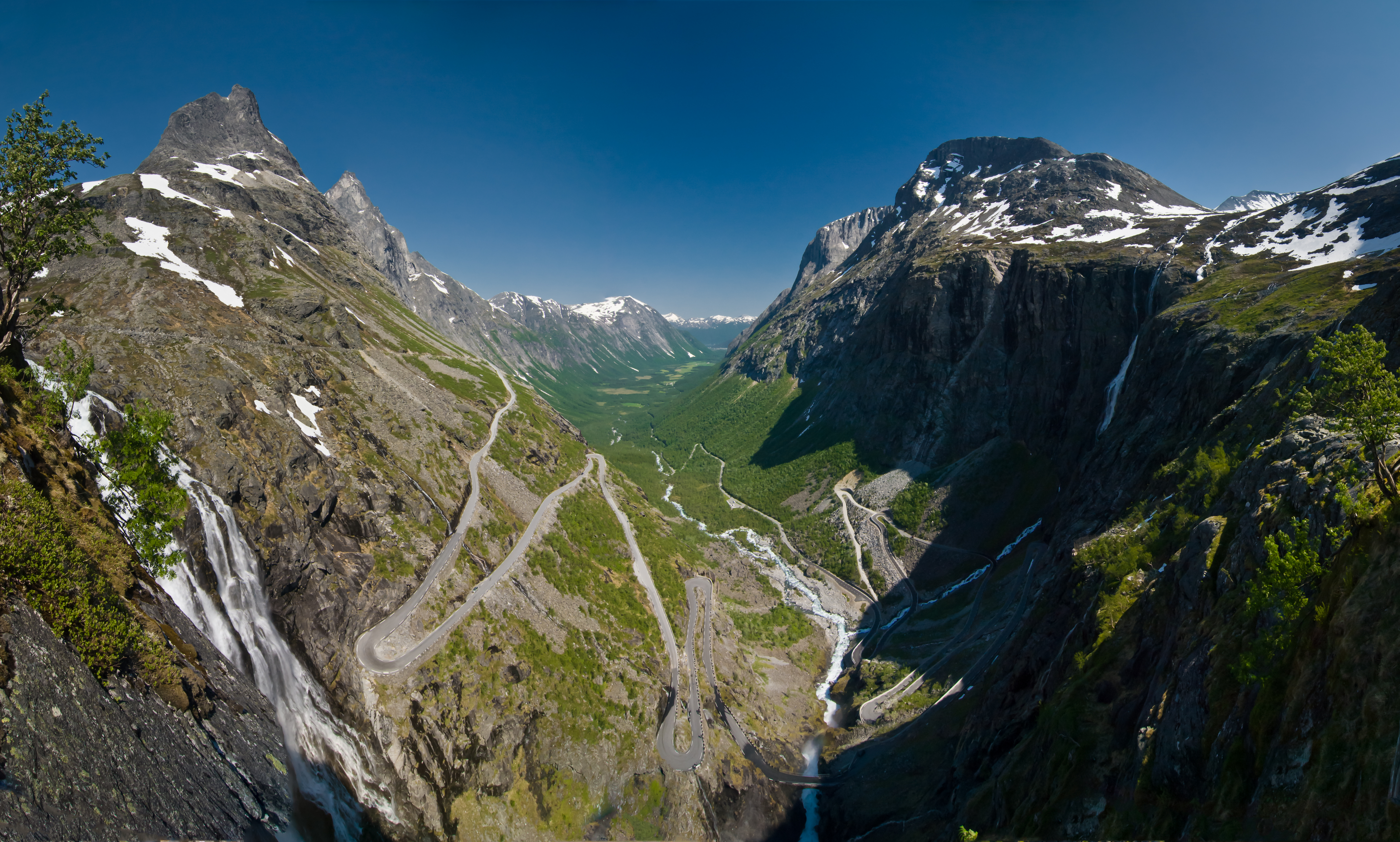 Trollstigen Norway